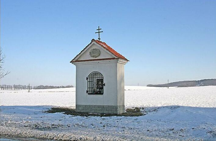 Nově zrekonstruovaná výklenková kaple u silnice z Humburk do Metličan, district Hradec Králové autor: Prazak